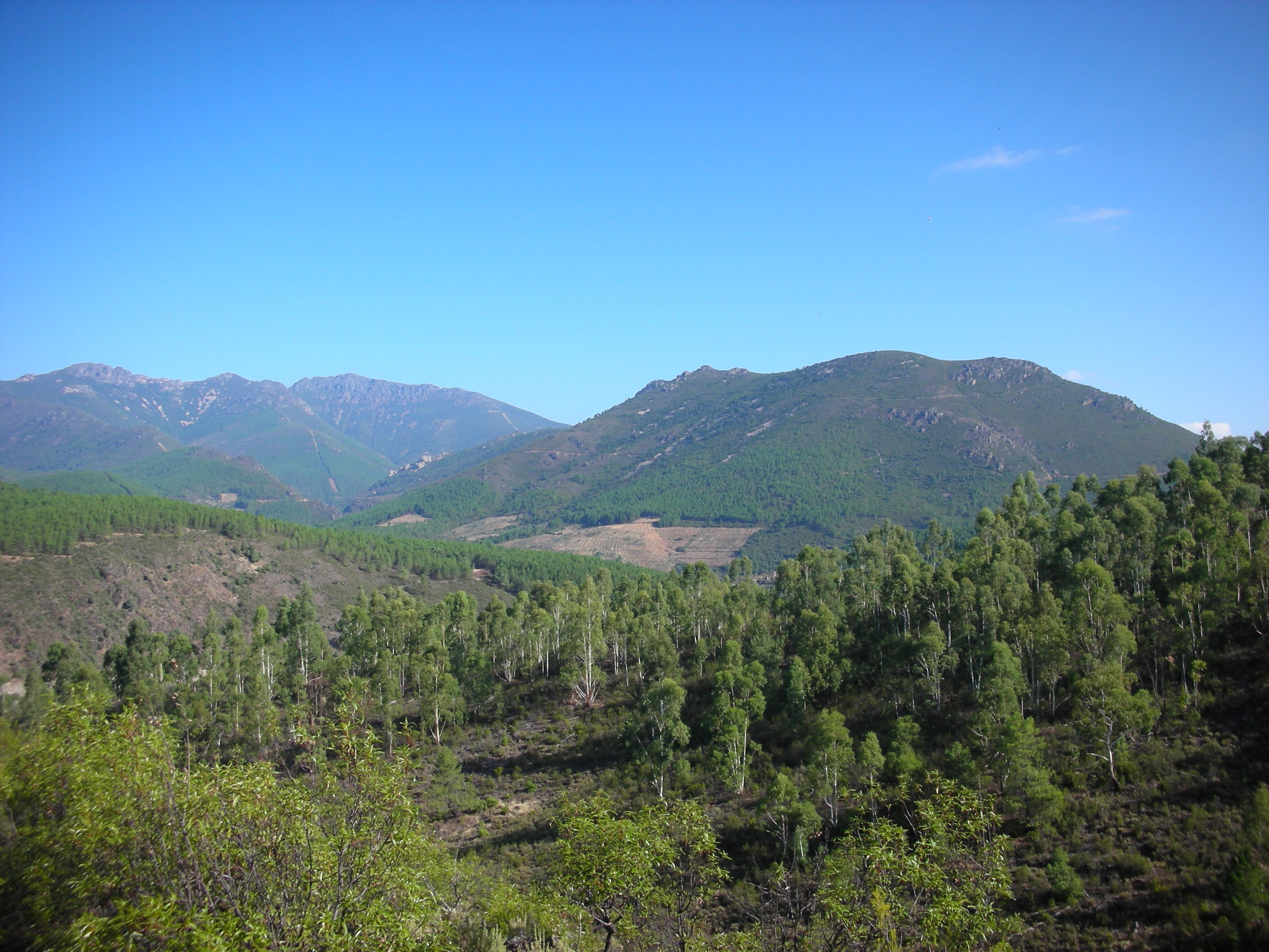 Topographie générale de la commune de Sotoserrano en Espagne